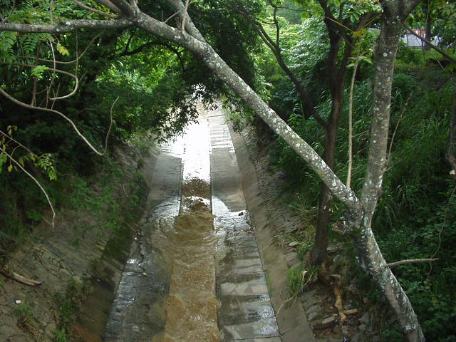 Rio El Valle Caracas - Venezuela Nota: Tome la imagen de esta fuente Venciclopedia: Rio El Valle.jpg ( y señala lo siguiente: Esta imagen ha sido liberada al dominio público por su autor. Esto aplica en todo el mundo, pero en algunos países esto no es posible, si ese es el caso: el autor concede a cualquier persona el derecho de usar este trabajo para cualquier propósito, sin condiciones, a menos que dichas condiciones sean requeridas por la ley.